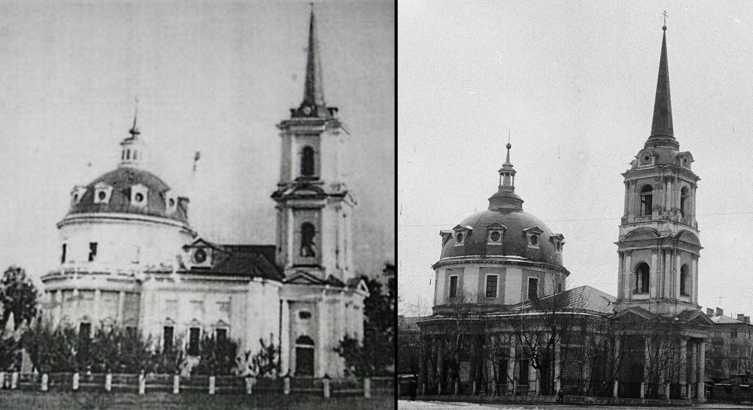 Сравнение храма Живоначальной Троицы в селе Жданово и храма Вознесения на Гороховом поле